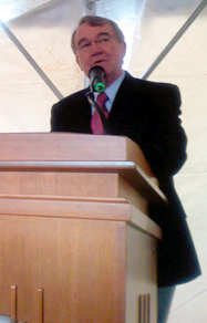 Roger S. Fouts delivering Washoe's Eulogy